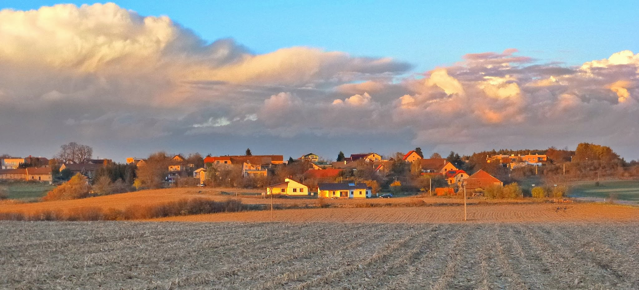 pohledpohled na obec Mokošín od rozcestí